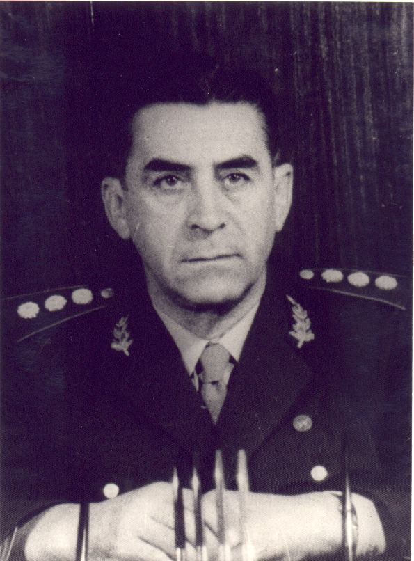 Teniente General Pascual Pistarini